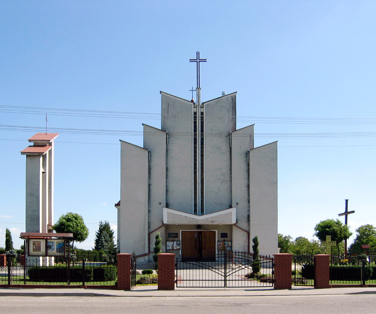 Czarna - Kościół